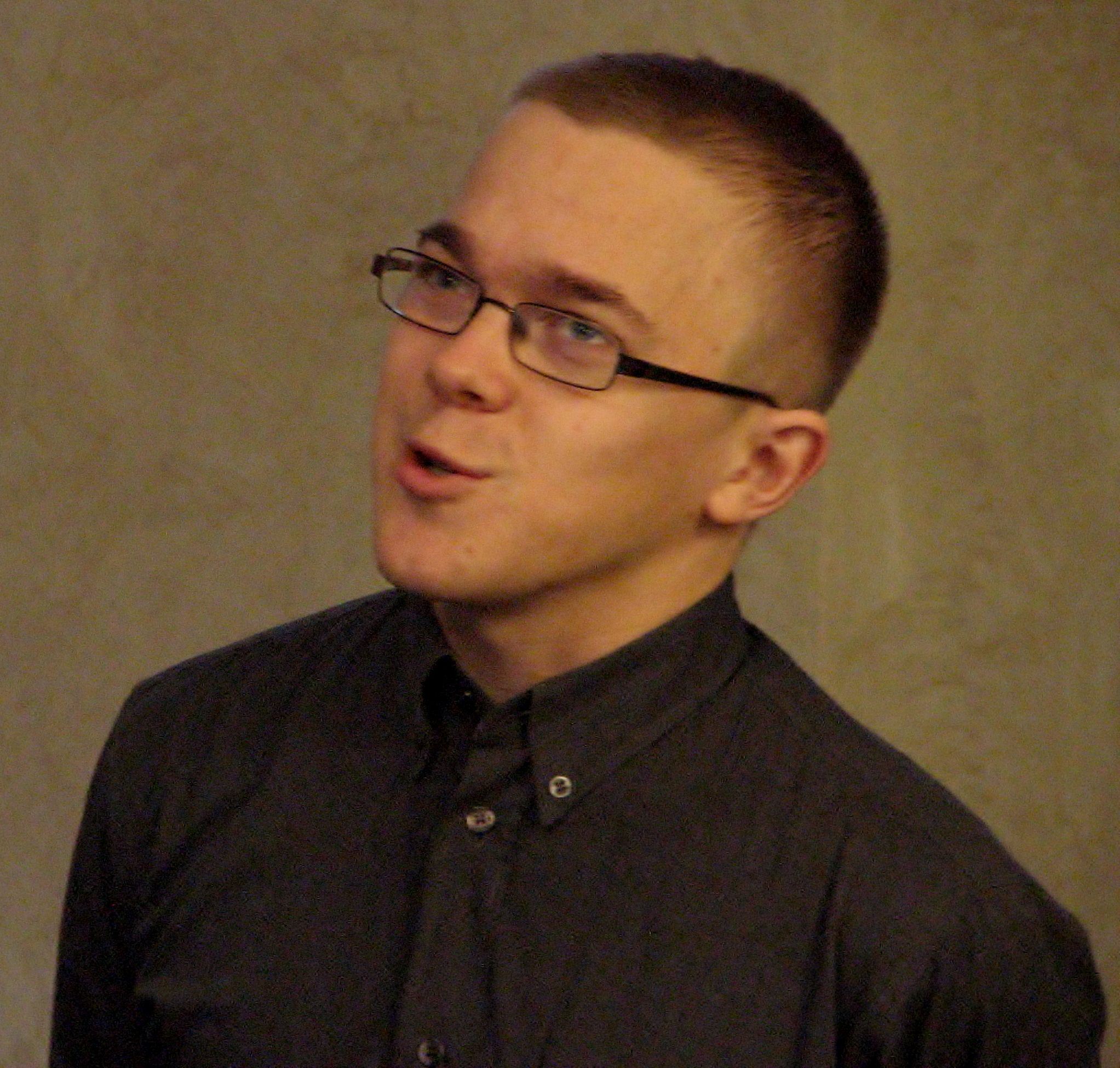 Taavi Simson Eesti Vabaerakonna vestlusringis Hiiu pubi teisel korrusel